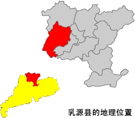 内容介绍：乳源在韶关地图上的标示 原创者：zhuwq 创作日期：2005年1月 创作方法：将广东地图用扫描仪输入电脑，再将图片导入FLASH，用画笔描出轮廓，着填充，删除原图片，导出JPG图象便大工告成，这样制作的优点是，开始辛苦了点，但绘制别的县市便替换颜色即可。